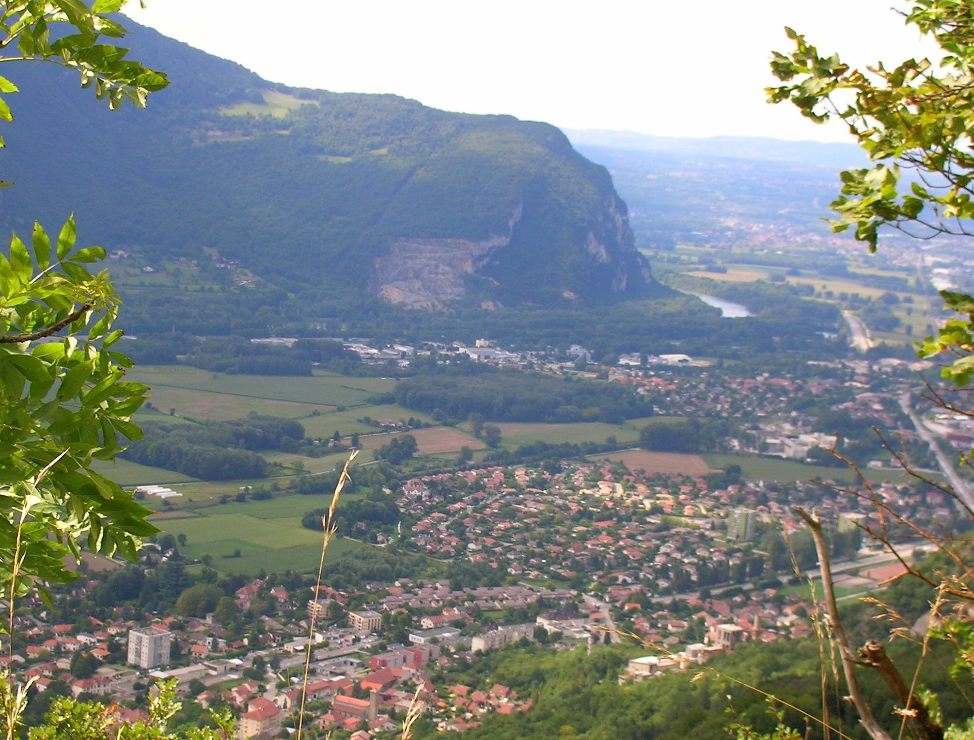 Voreppe (?) vu depuis le Tour de Mont St Martin vers la Cheminée